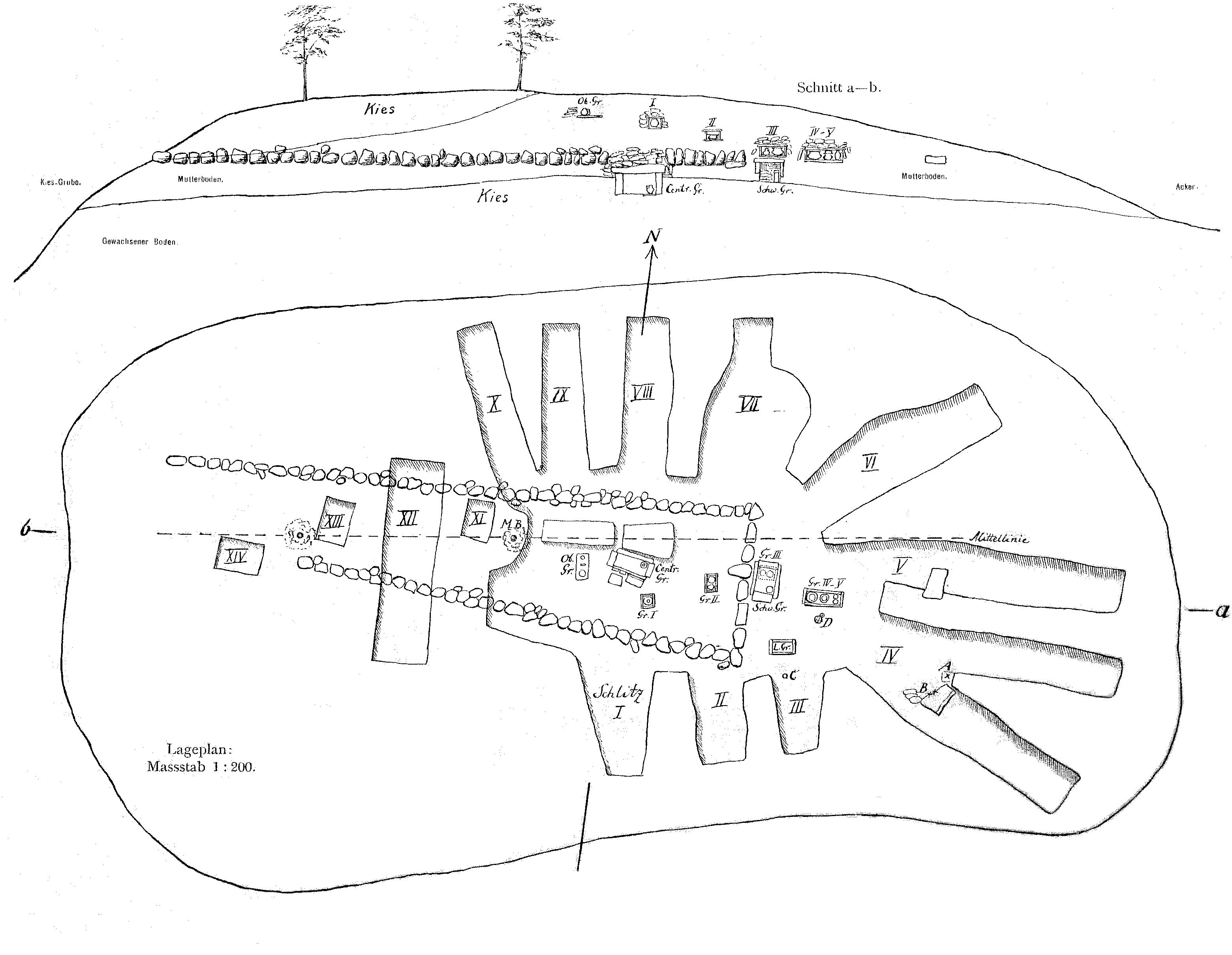 Querschnitt und Grundriss des Pohlsbergs